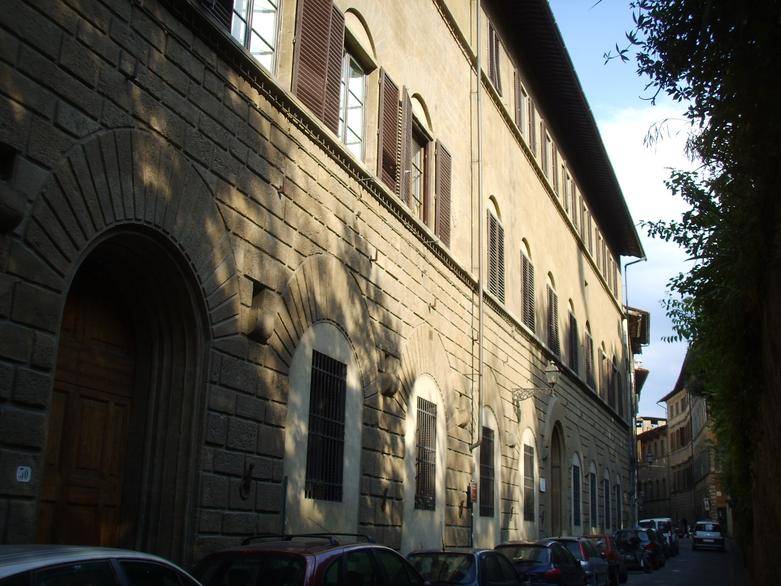 Palazzo Canigiani or Bardi-Larioni or degli Ilarioni